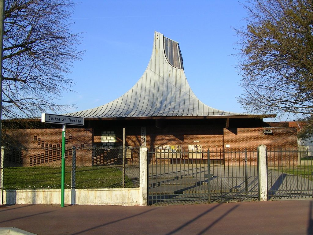 Eglise Saine-Thérèse, rue de Marseille, quartier Vert-Galant Photo personnelle (own work) de Marianna